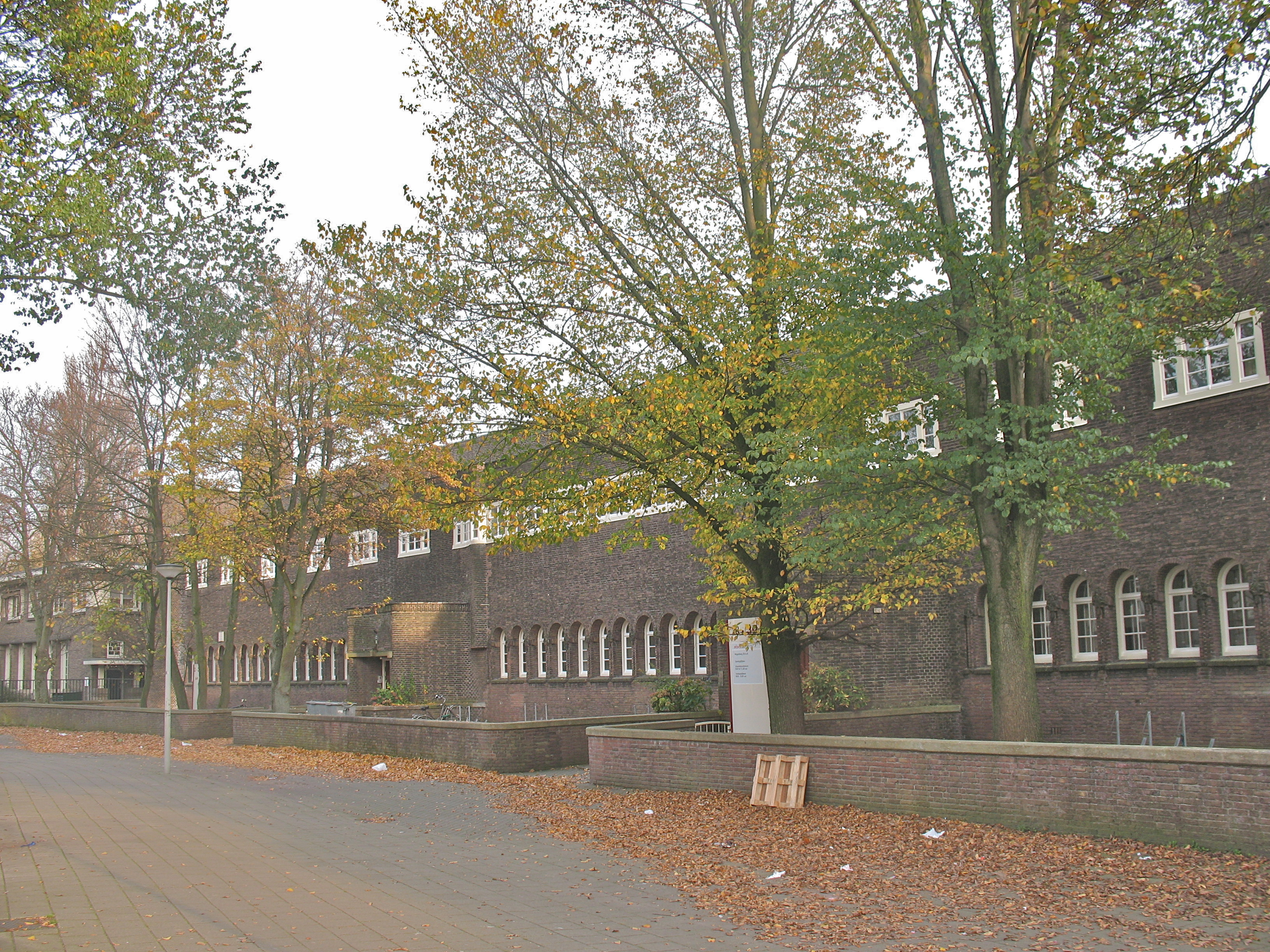 Dubbele lagere school in de polder Buiksloterham, Amsterdam-Noord, Resedaschool, Wingerdschool. Gentiaanbuurt, Wingerdweg.